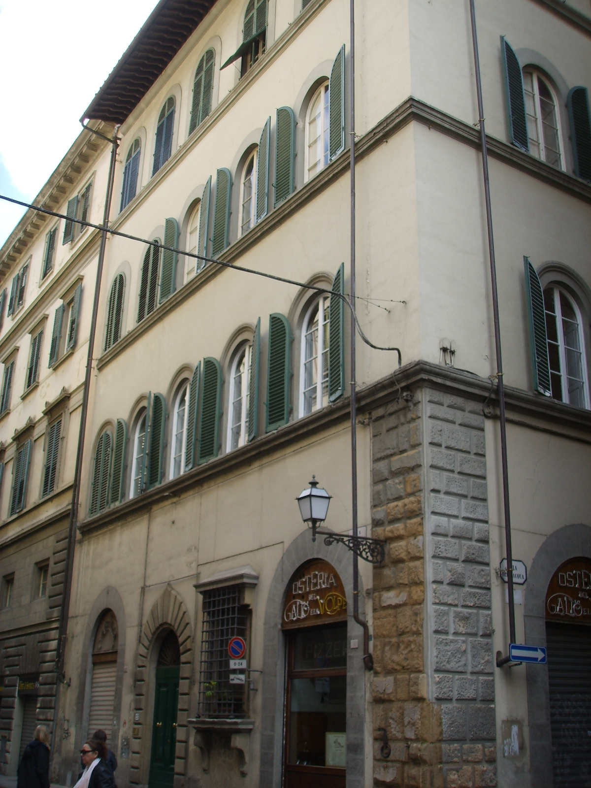 Palazzo covoni